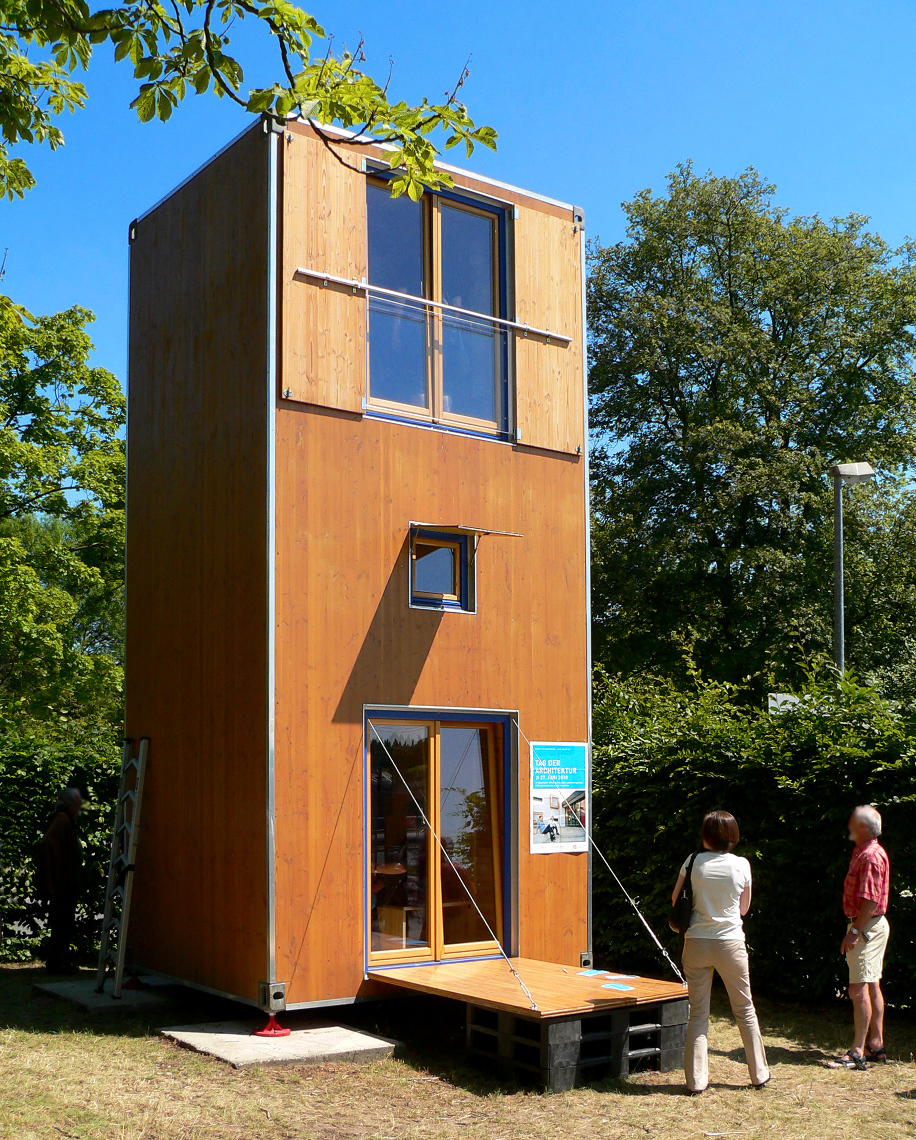 Dreigeschossiger Wohncontainer "HomeBox 1" von 2008 (Unten: Küche, Bad, Terrasse, Mitte: Schlafen, Oben: Wohnen) in den Maßen eines Normalcontainers, hochkant aufgestellt, fotografiert im Juni 2010 zum Tag der Architektur bei temporärer Aufstellung am Welfengarten in Hannover, Foto in Wikicommons eingestellt mit Genehmigung des Entwicklers/Architekten Han Slawik (